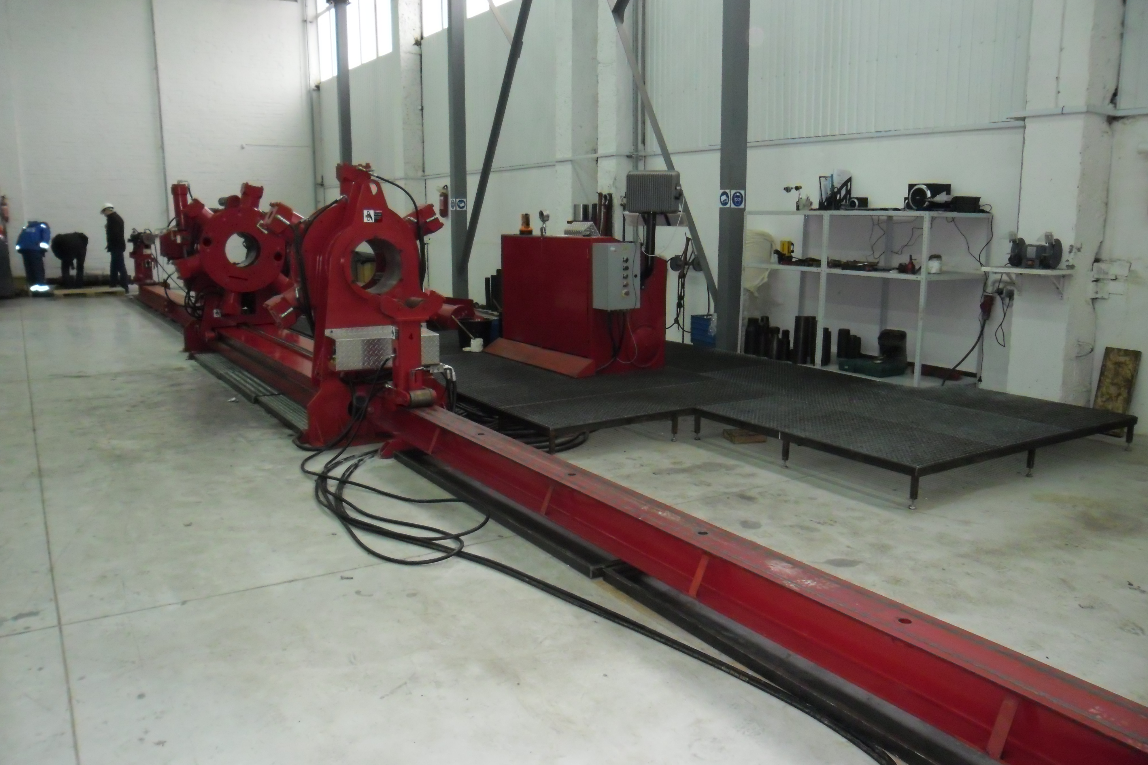 Фото